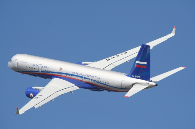 Tupolev Tu-214 at 2011 MAKS